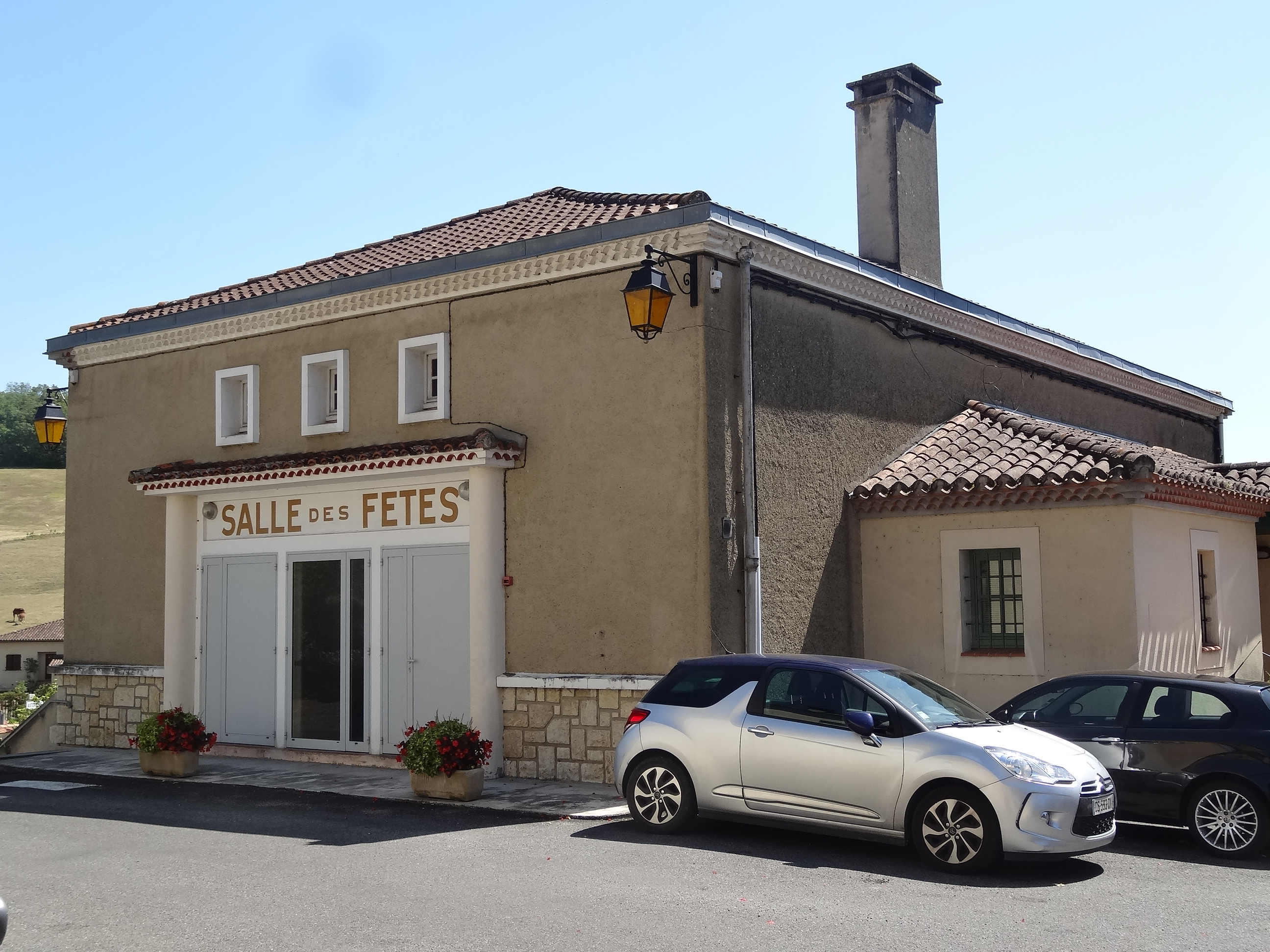 Salle des fêtes de Pessan.